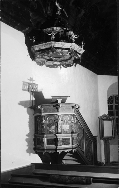 Predikstol efter behandlingen. Kategori: (02) PredikstolarPredikstol efter behandlingen.